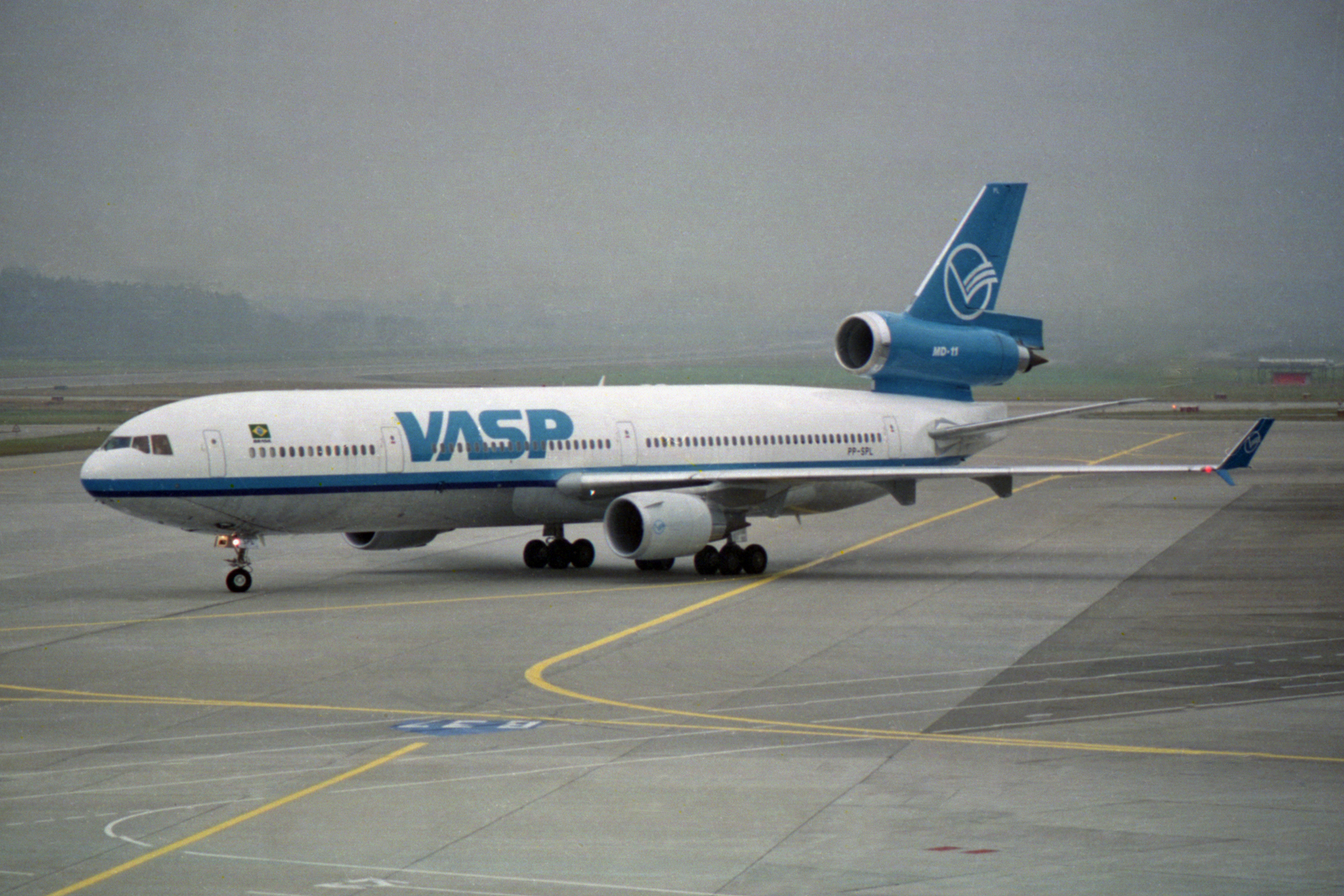 Zürich (- Kloten) (ZRH / LSZH) Switzerland 11.1997